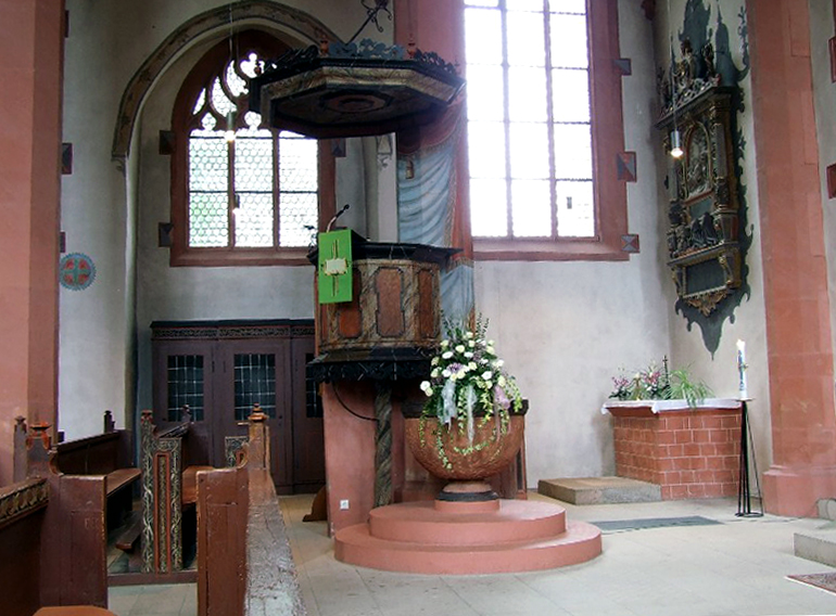 Simultankirche in Bechtolsheim im Hintergrund der Petersberg